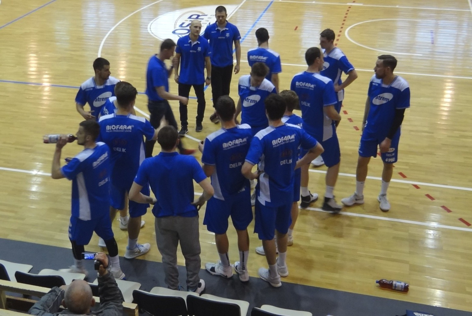 Basket Poznań, 14.04.2018